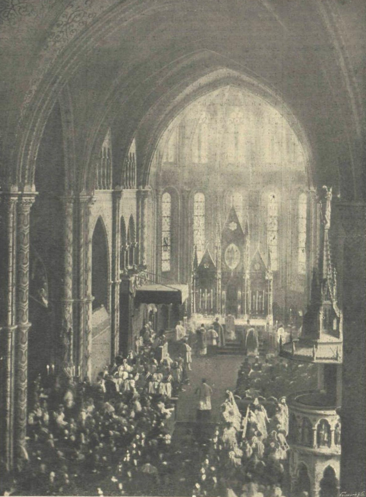 Millennium 1896